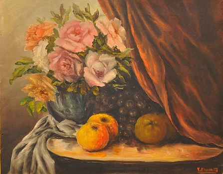 Natura morta, olio su tela, 40 x 50 cm., firmato, coll. privata